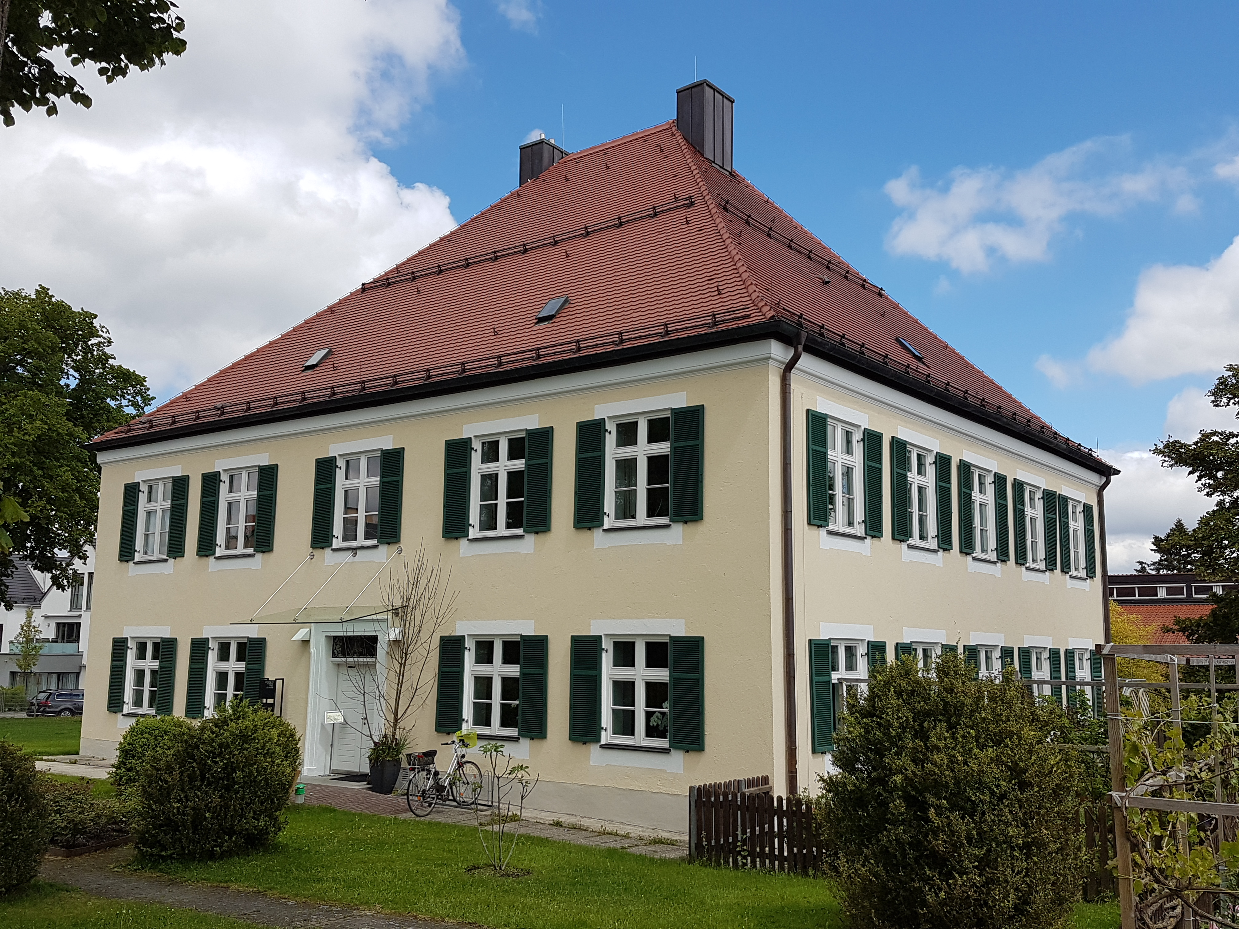 Markt Schwaben, Pfarrhaus